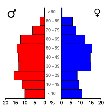 Age pyramids for the 443 municipalities in the Netherlands. Data 2007. Statistics provided by Centraal Bureau voor de Statistiek, Voorburg/Heerlen. Source: Tabel: Bevolking Nederland per gemeente en diverse regio's naar leeftijd, geslacht en burgerlijke staat, 1 januari 1988-2007. Gewijzigd op 24 mei 2007 (on-line database StatLine) Bevolkingspiramide - Gemeente Terschelling (2007).png